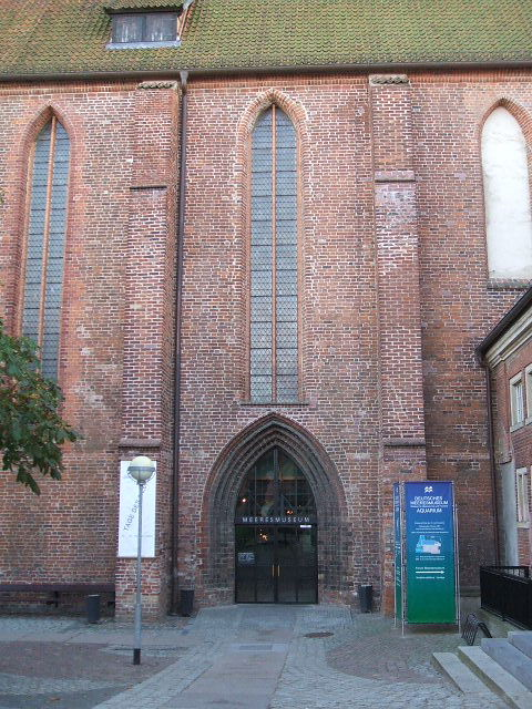 Eingang zum Meeresmuseum in Stralsund im Katharinenkloster